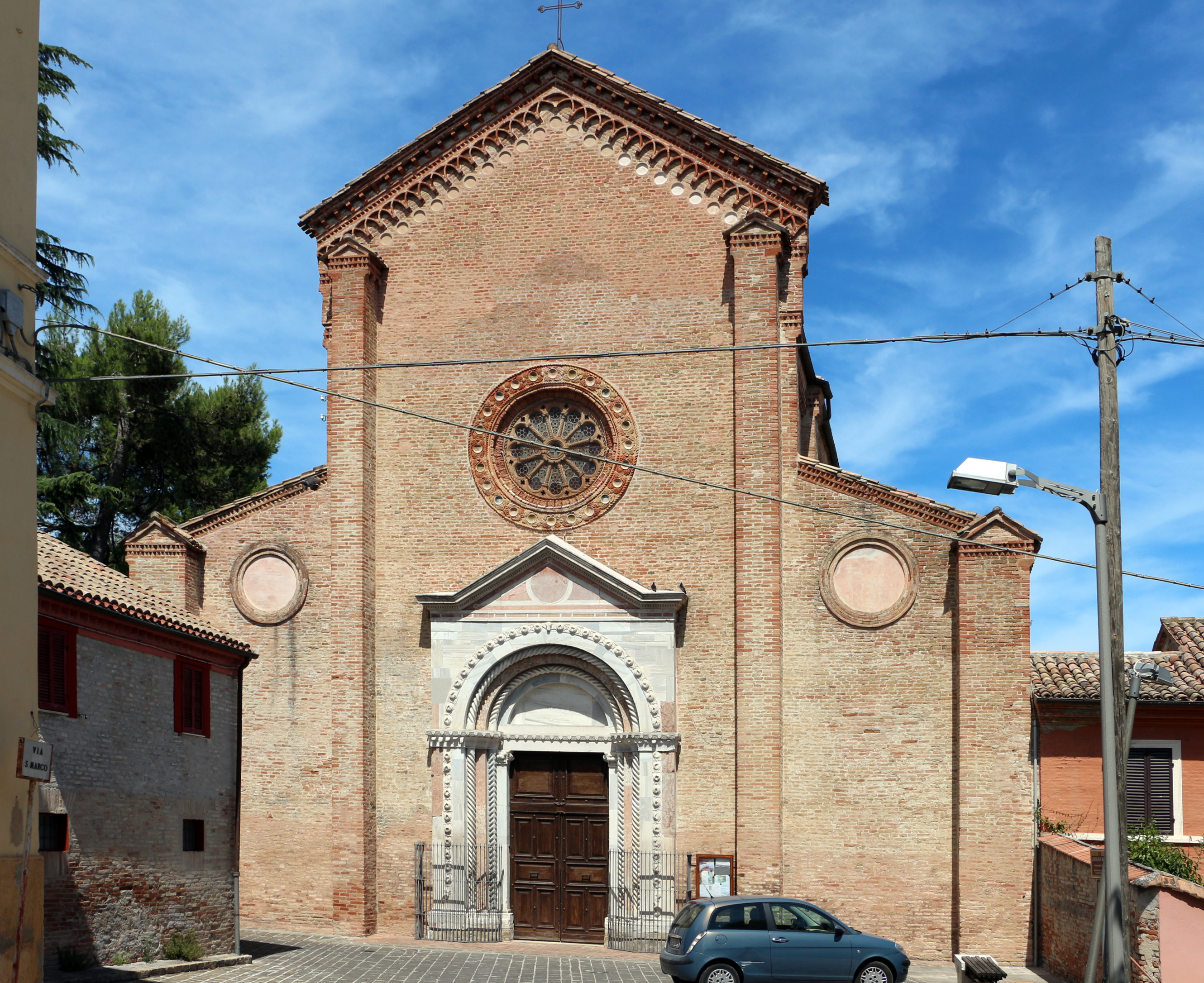 Chiesa di San Marco This is a photo of a monument which is part of cultural heritage of Italy.